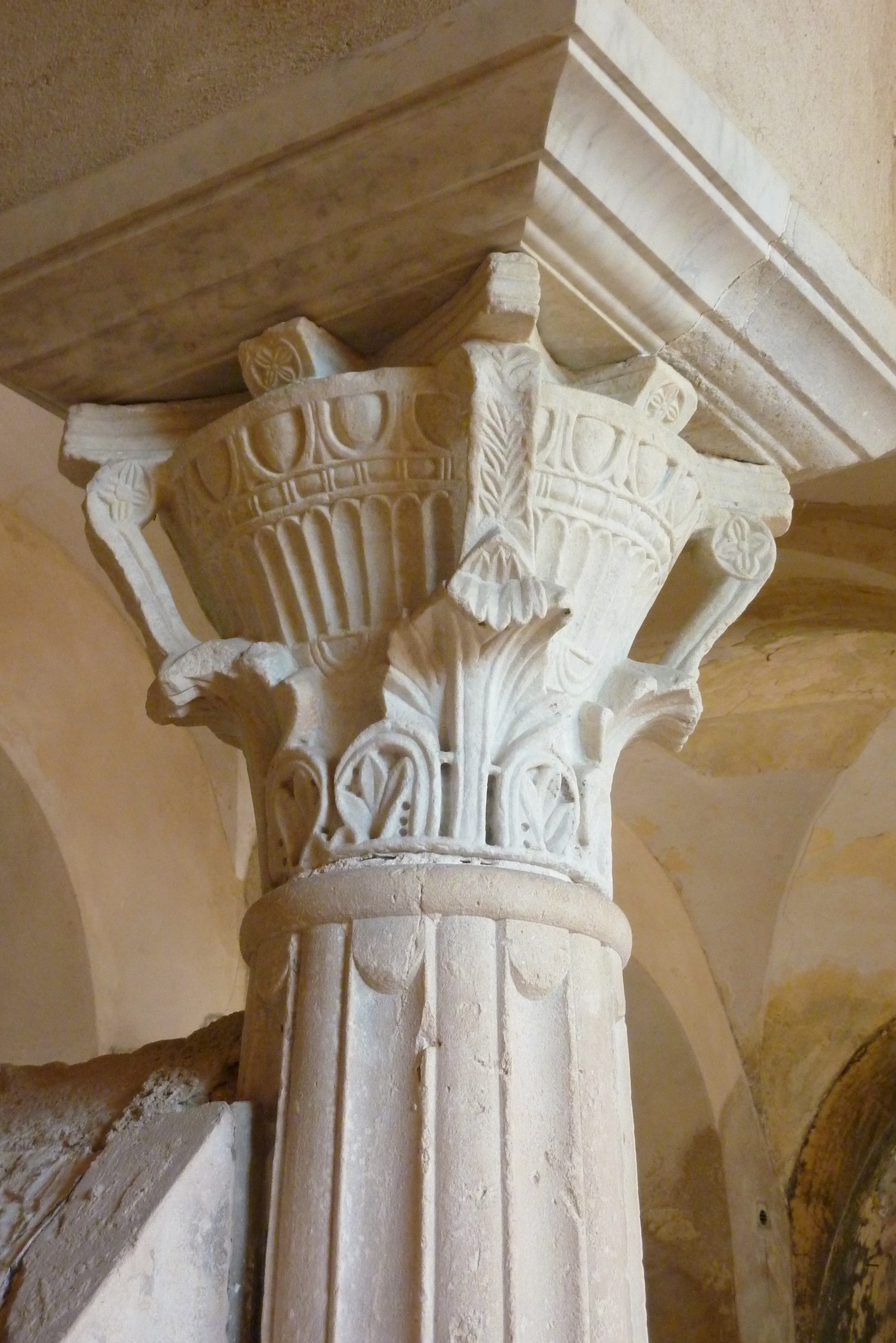 Crypte Saint-Paul in Jouarre